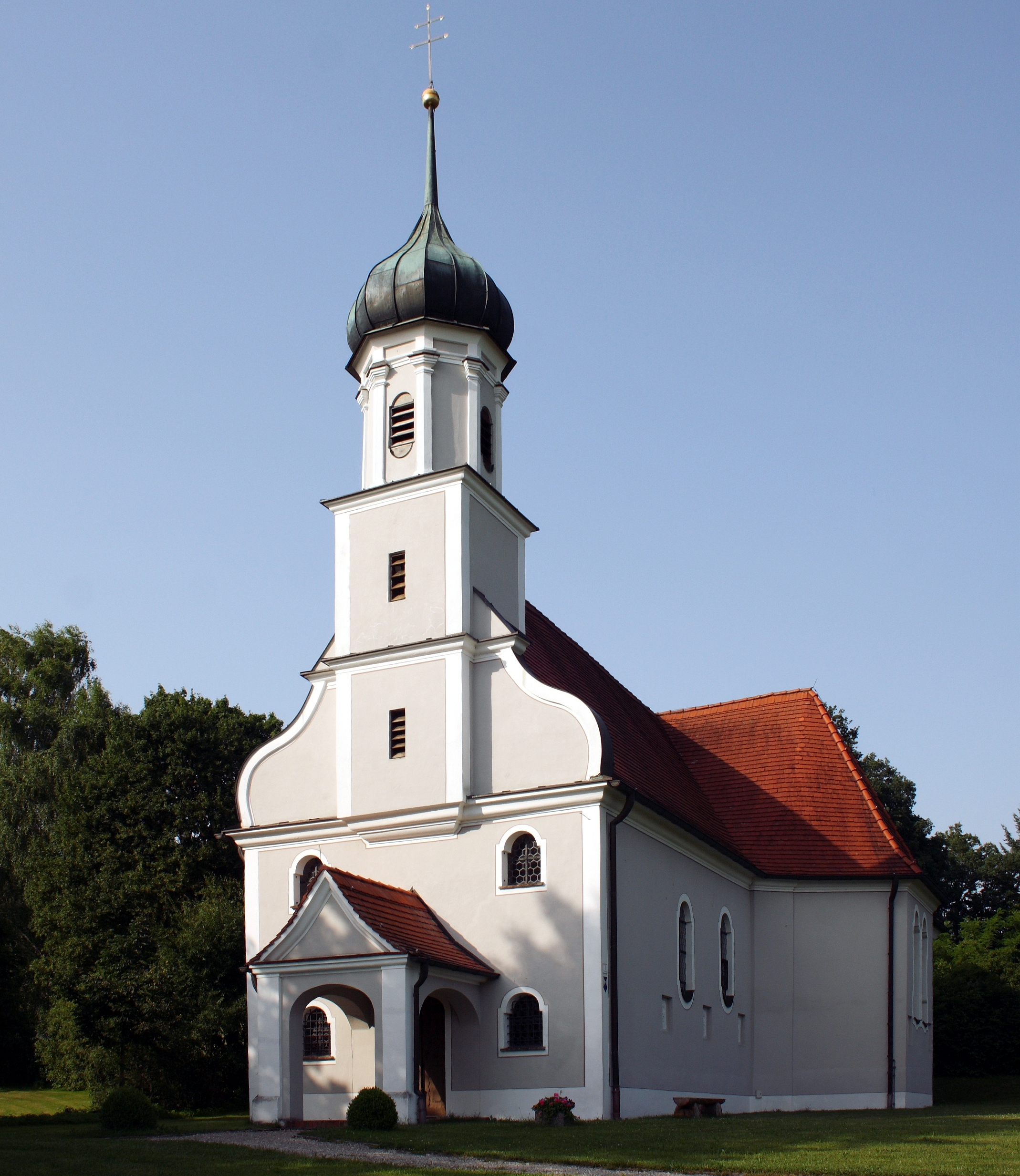 Katholische Wallfahrtskirche Heilig Kreuz in Mindelaltheim, einem Ortsteil von Dürrlauingen im Landkreis Günzburg (Bayern)